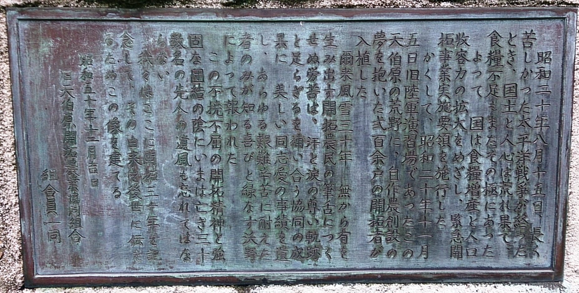 天伯原開拓30周年記念像「土に挑む男」の背面にある碑文。天伯原開拓の歴史や想いが刻まれている。この下部には、入植者の氏名一覧を刻んだものも設置されている。